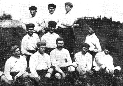 Equipe de l'olympique de Sète 1901.